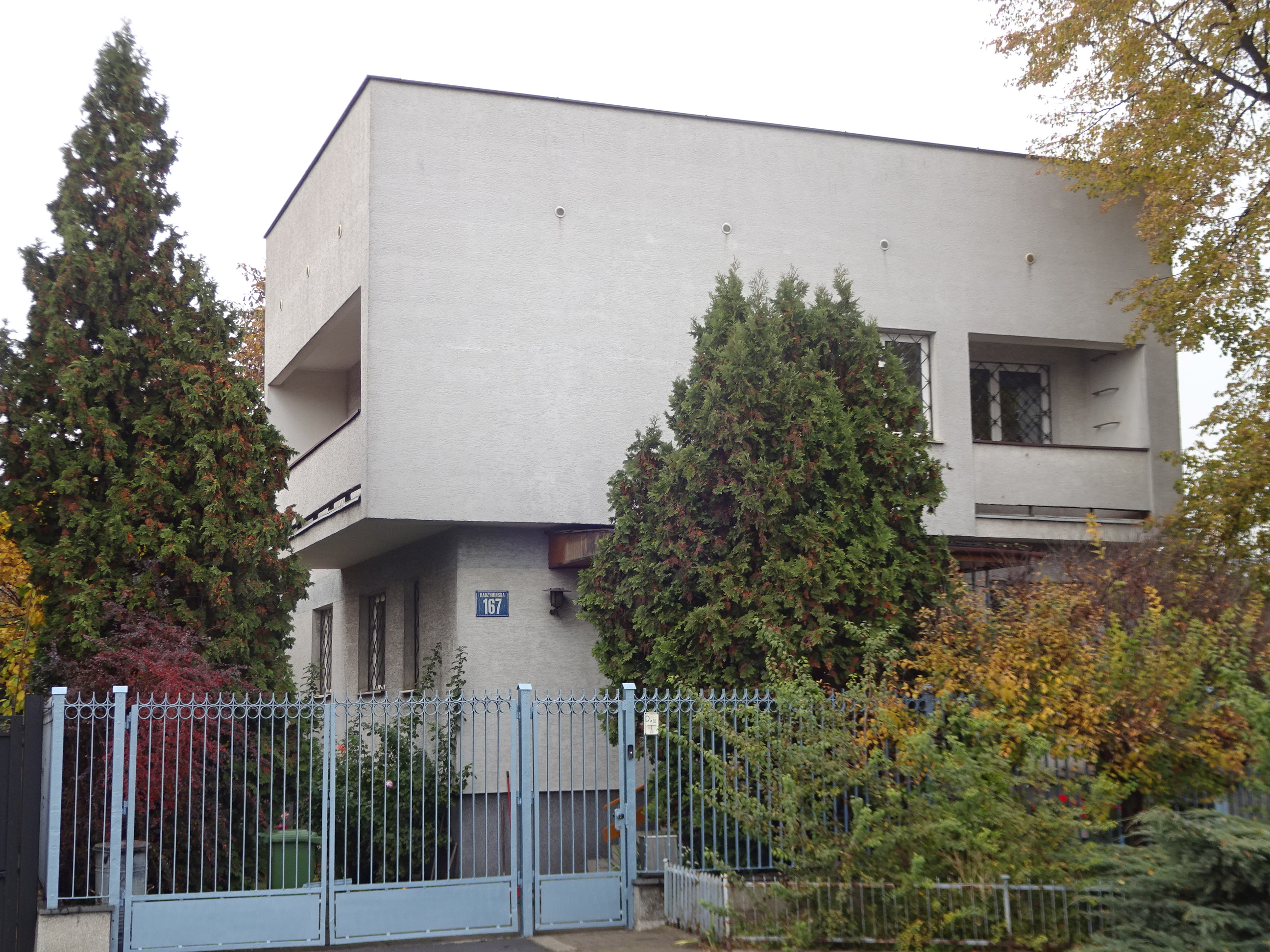 Dom, który zbudował sobie Kazimierz Muranty